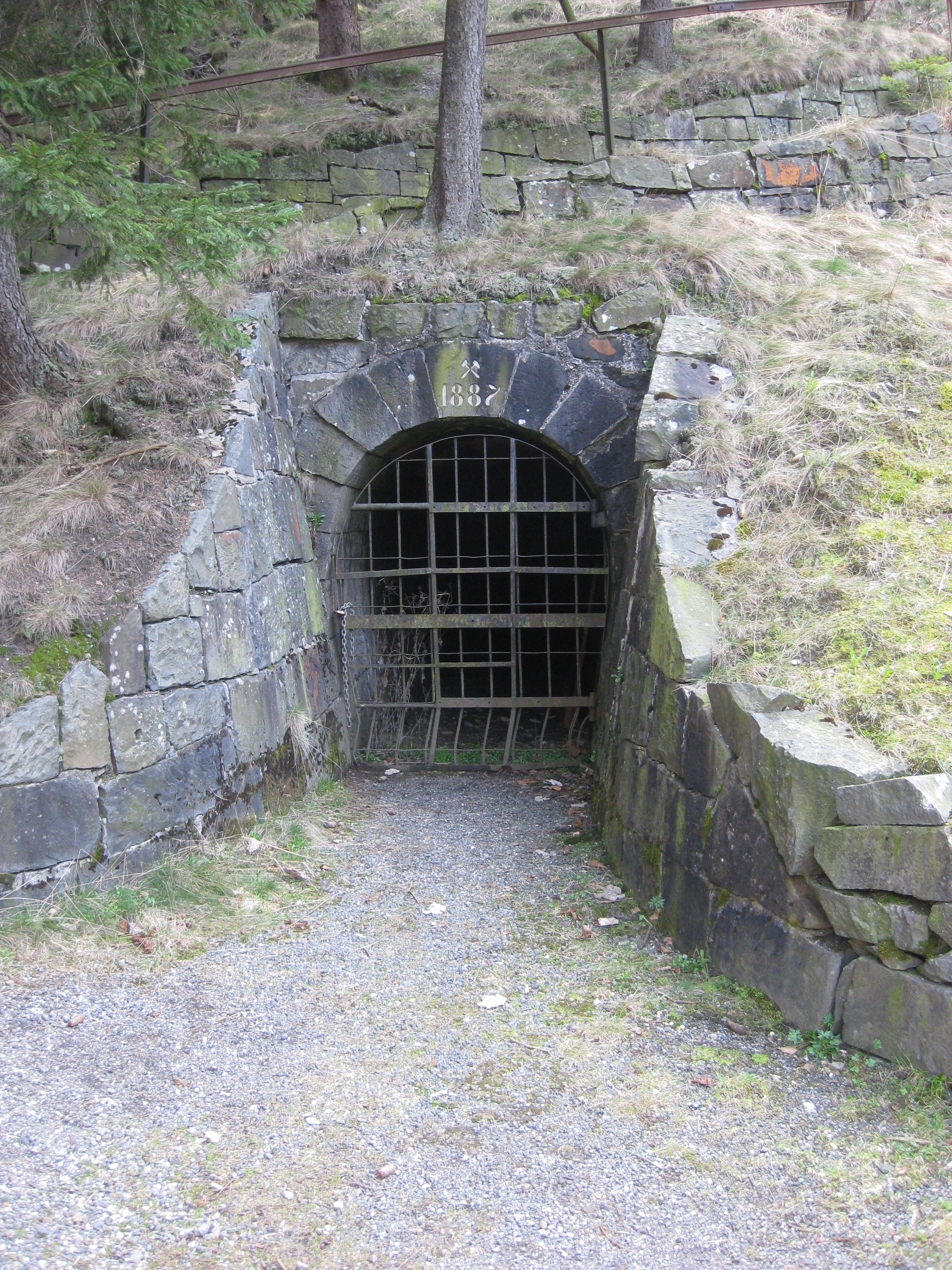 Mundloch des Förderstollens der Grube Güte des Herrn in Lautenthal/ Harz